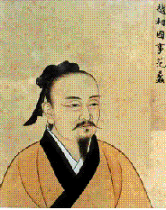 Fanli